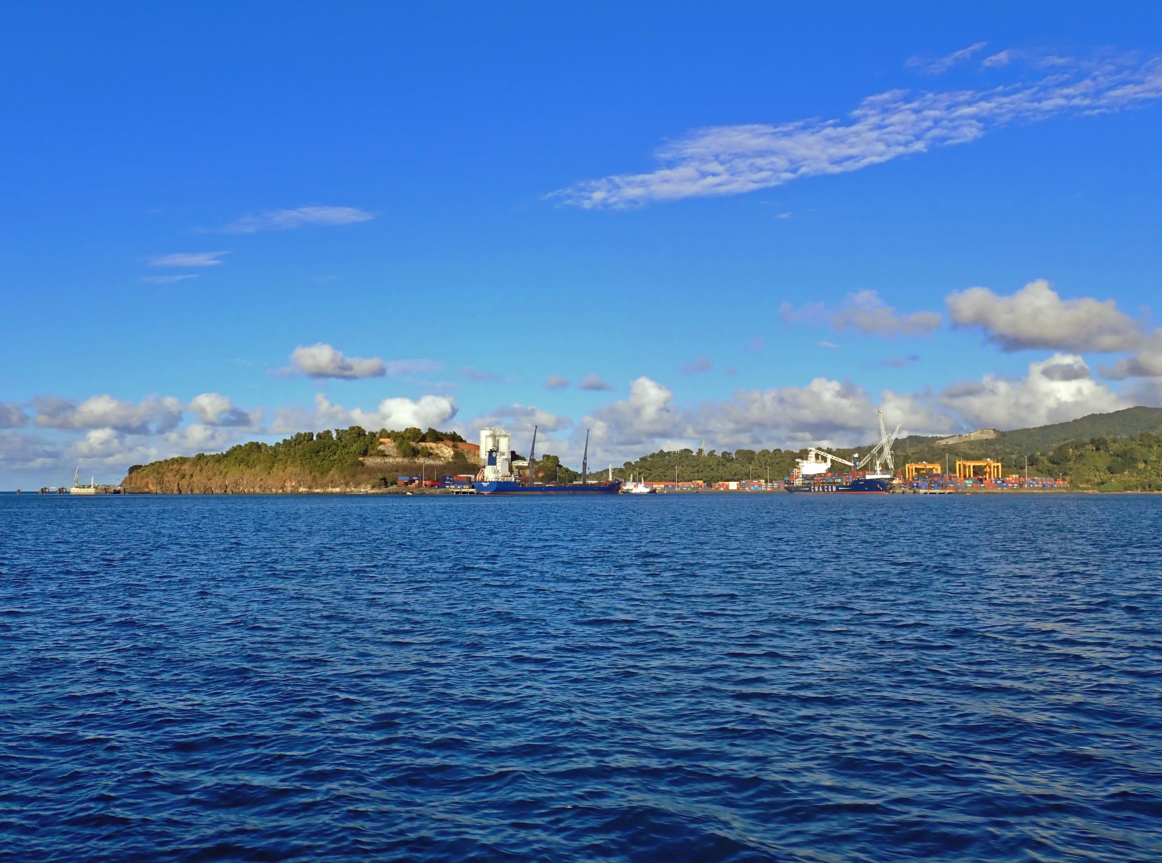 Le port de Longoni (commune de Koungou), à Mayotte.